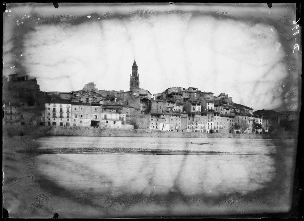 Imatge